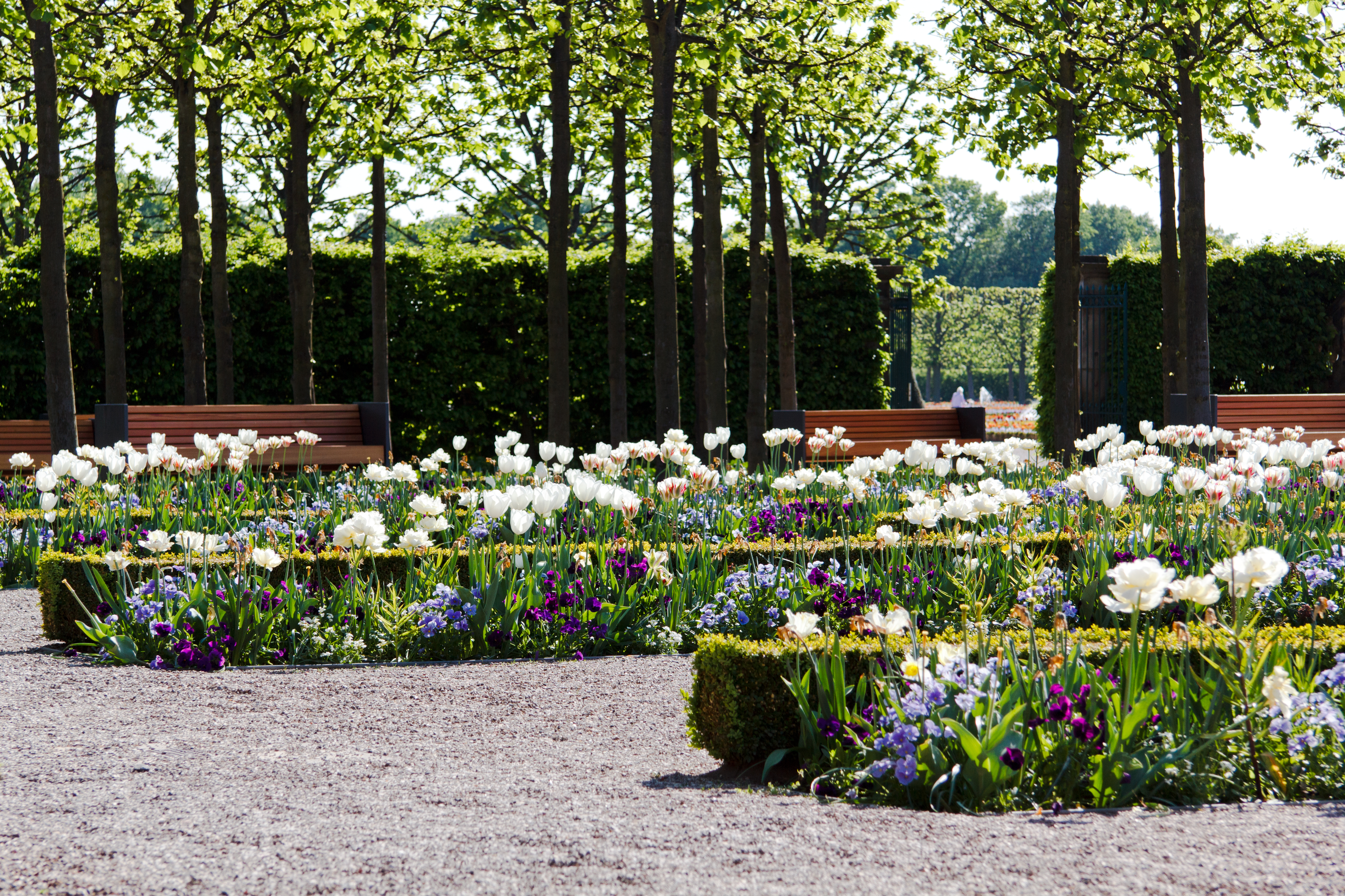 Guido Hager, Blumengarten, ca. 2000 (Hannover, Großer Garten).